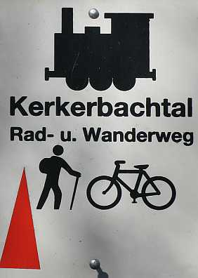 Hinweisschild Rad und Wanderweg Kerkerbachtal, Hessen, Deutschland